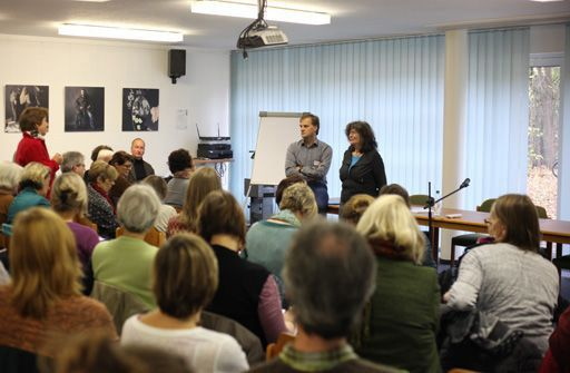 Kriegsenkeltagung, Helmstedt 2014